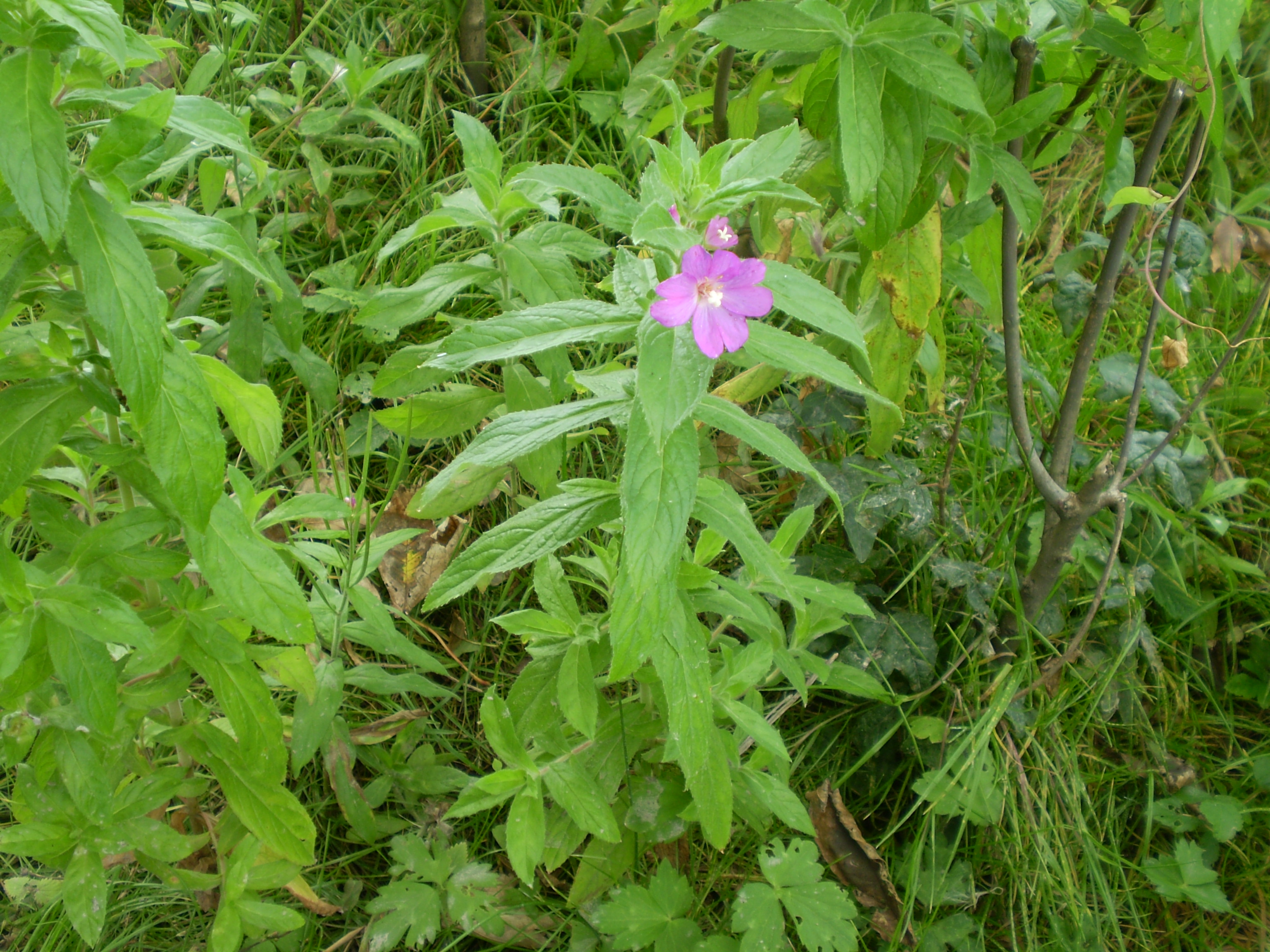 Epilobium hirsutum viltige basterdwederik